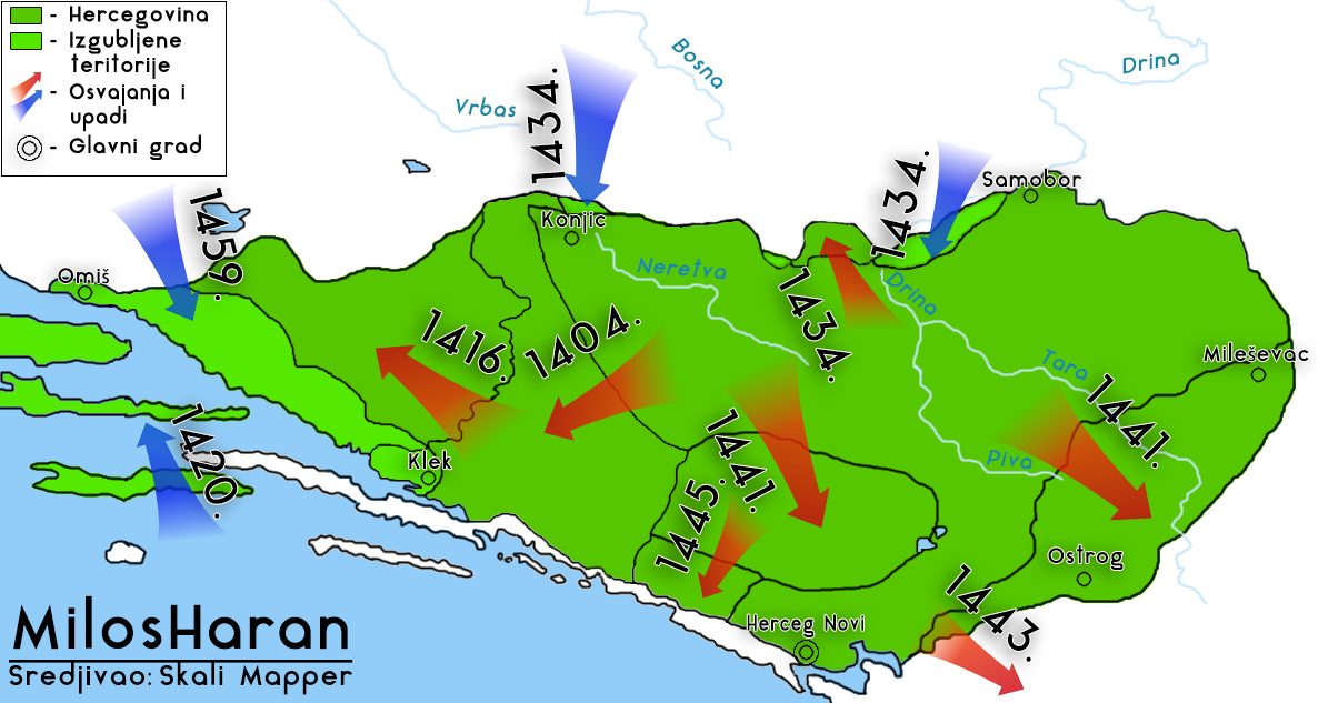 Херцеговина пре турских освајања.